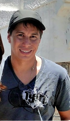 Foto tirada com o meio-campista Darío Conca, do Fluminense Football Club, em Laranjeiras, onde o time principal treina.